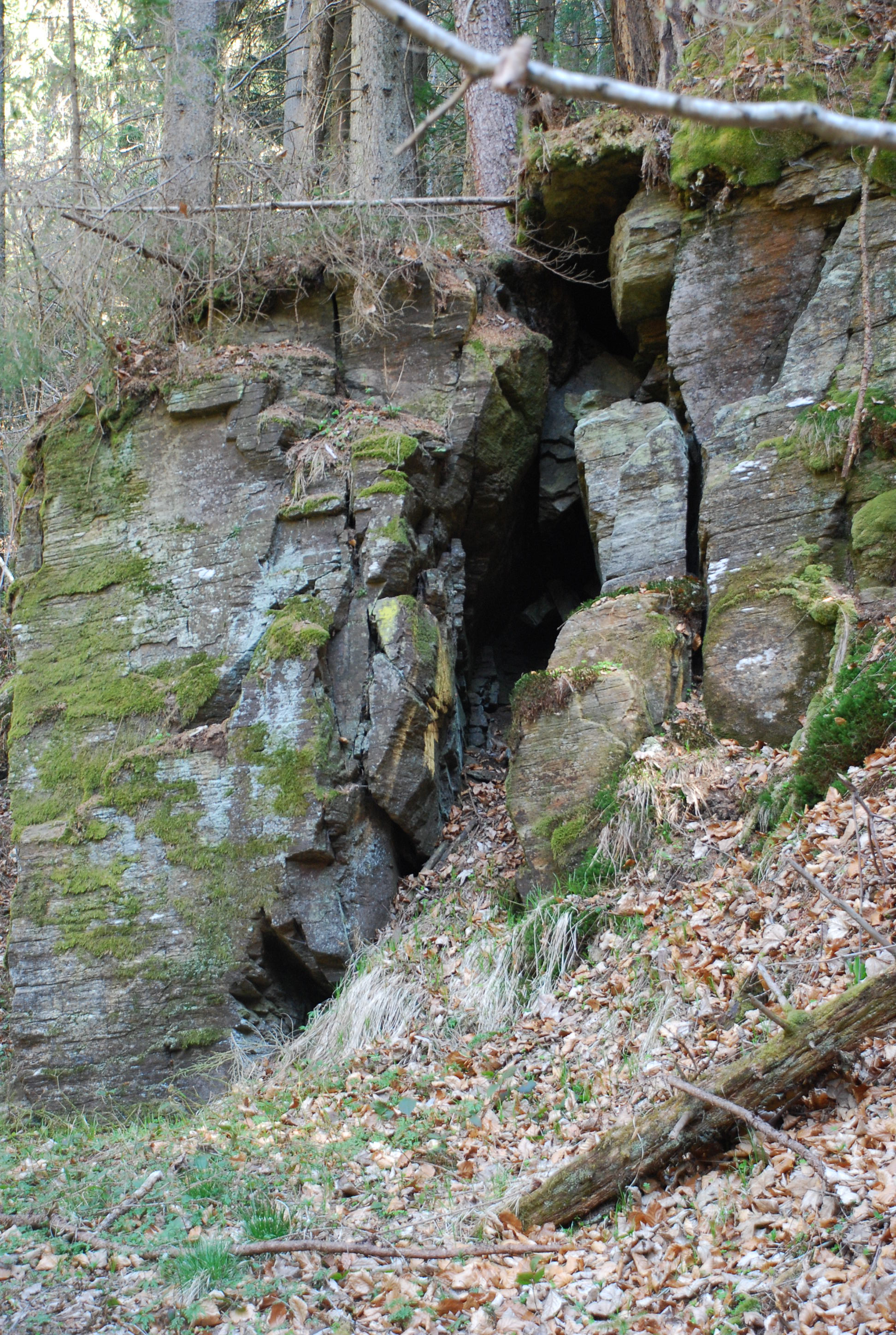 Mausegger Graben, Marhof, Steiermark, Österreich: Details zur Umgebung